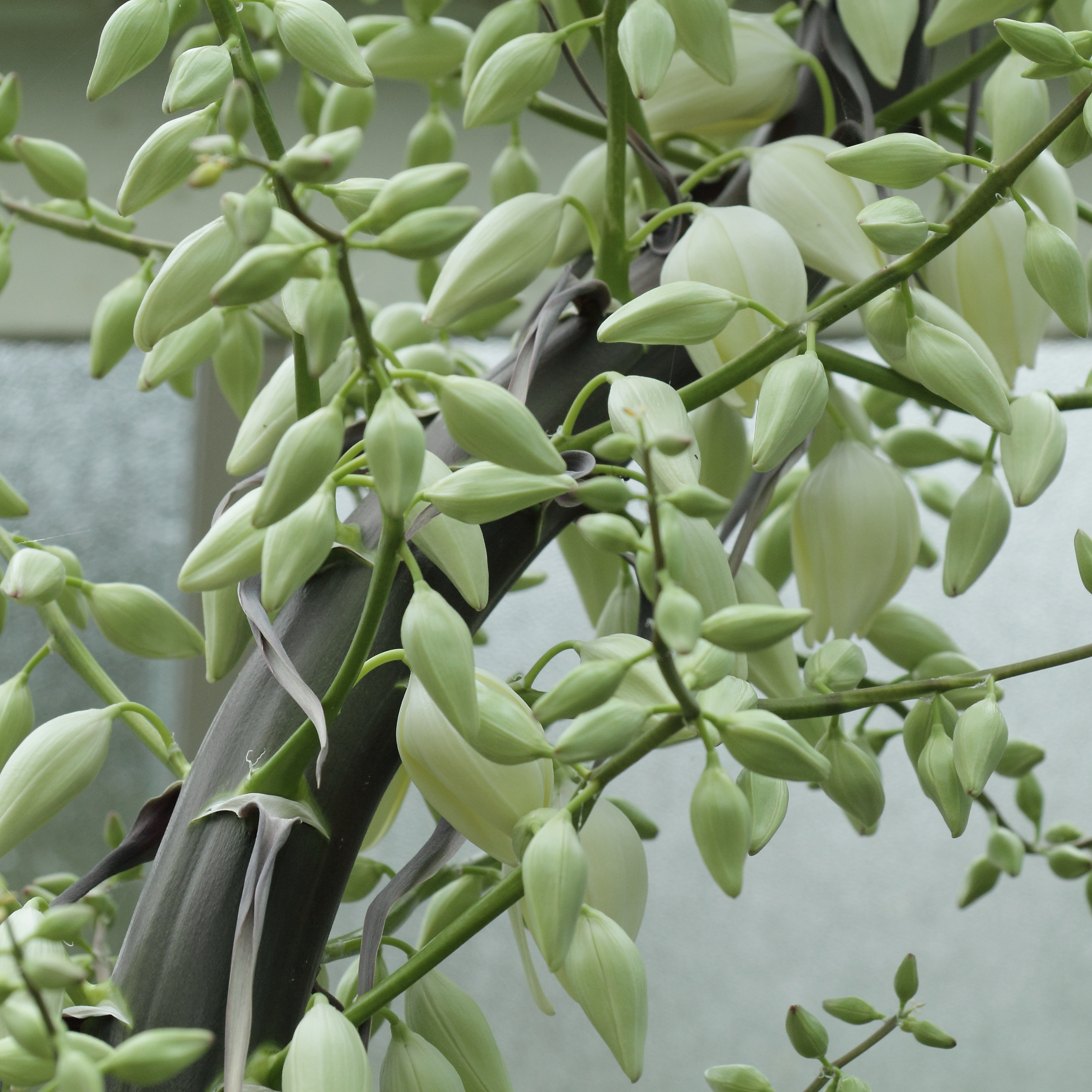 Yucca whipplei, identifierad med hjälp av befintlig skylt vid Kew Gardens, London.